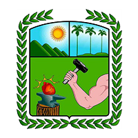 Escudo del Municipio de Palmira.